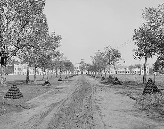 Central Avenue, U.S. Arsenal, Augusta, Ga.